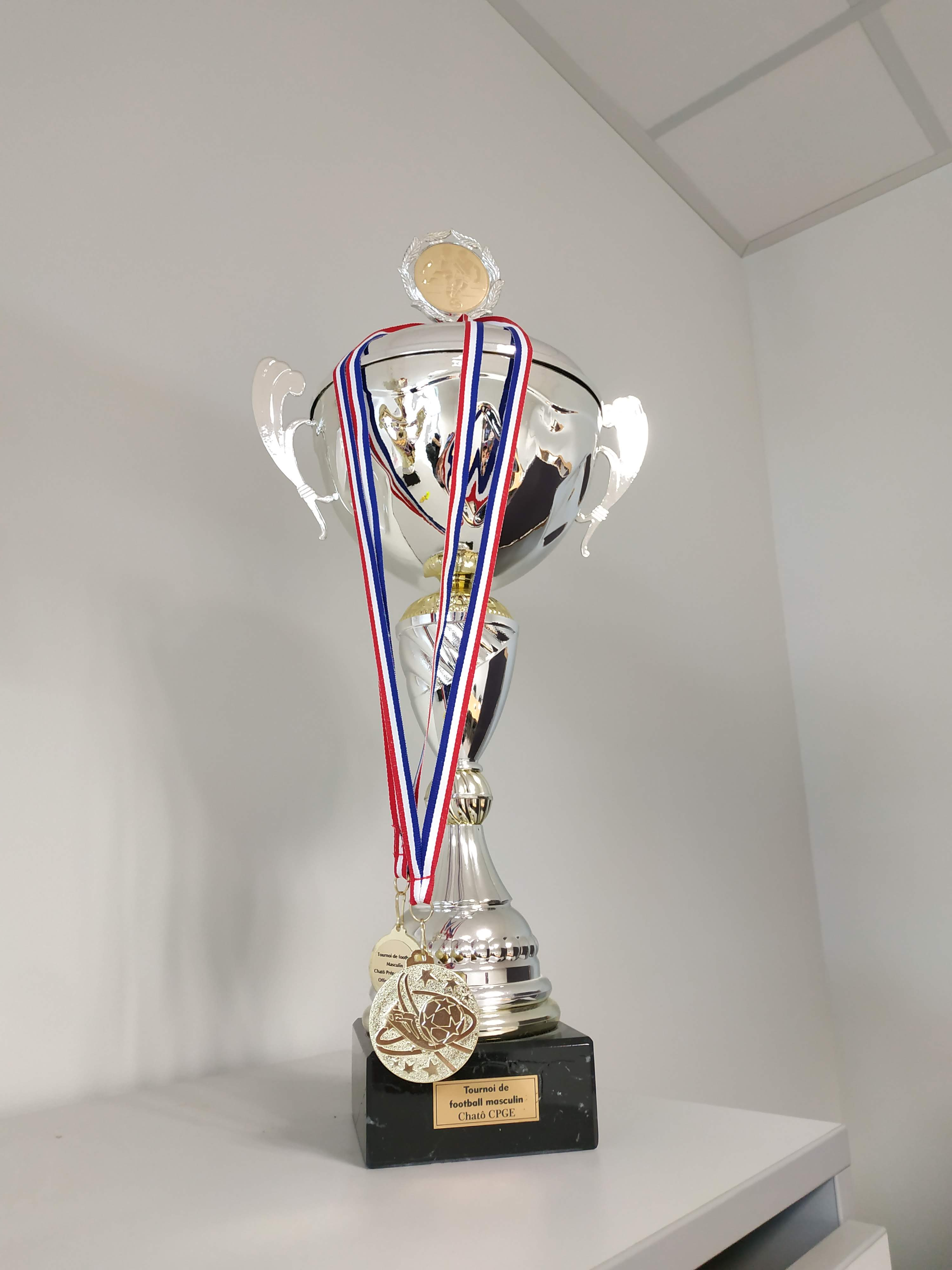 Trophée